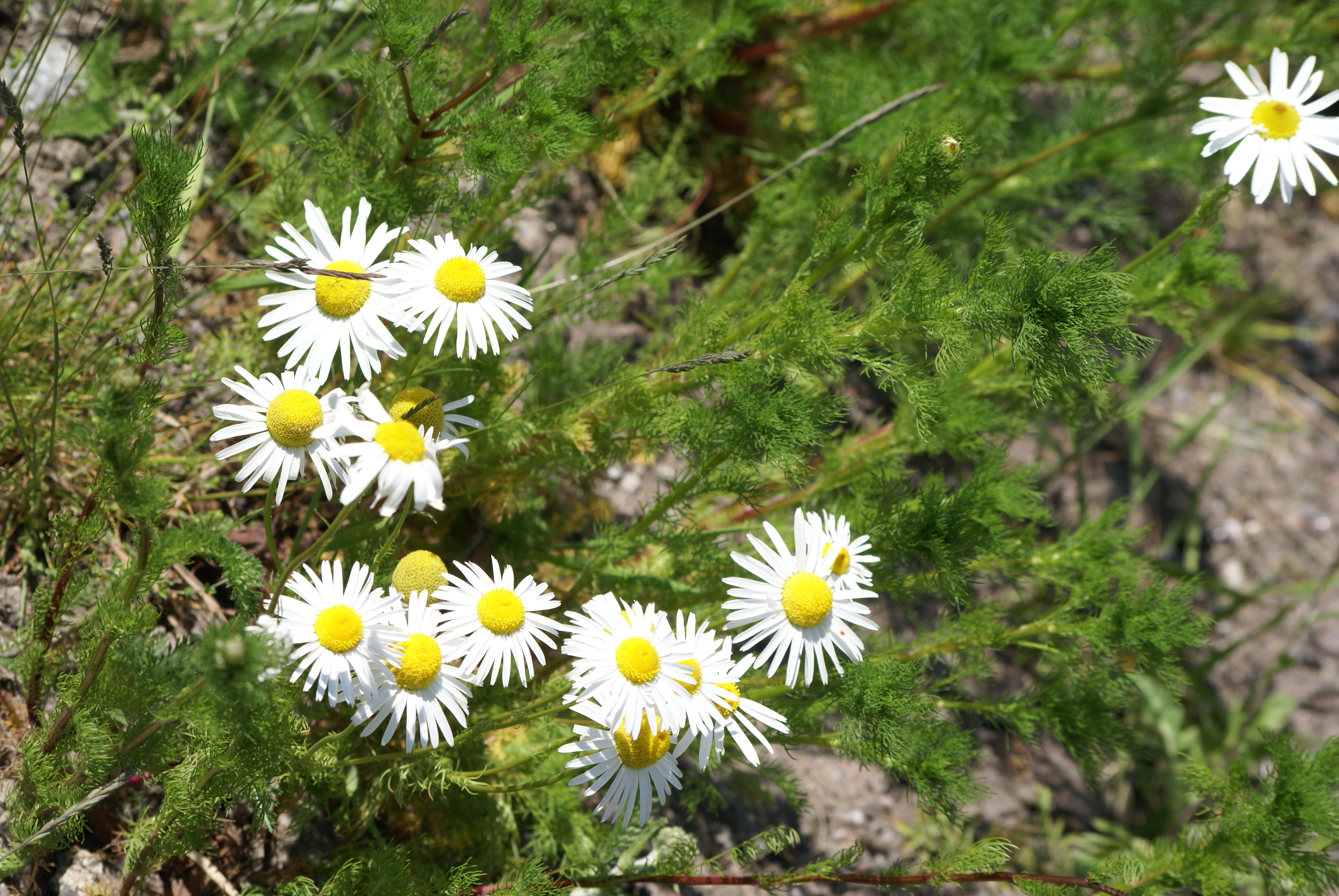 Plant species Tripleurospermum perforatum